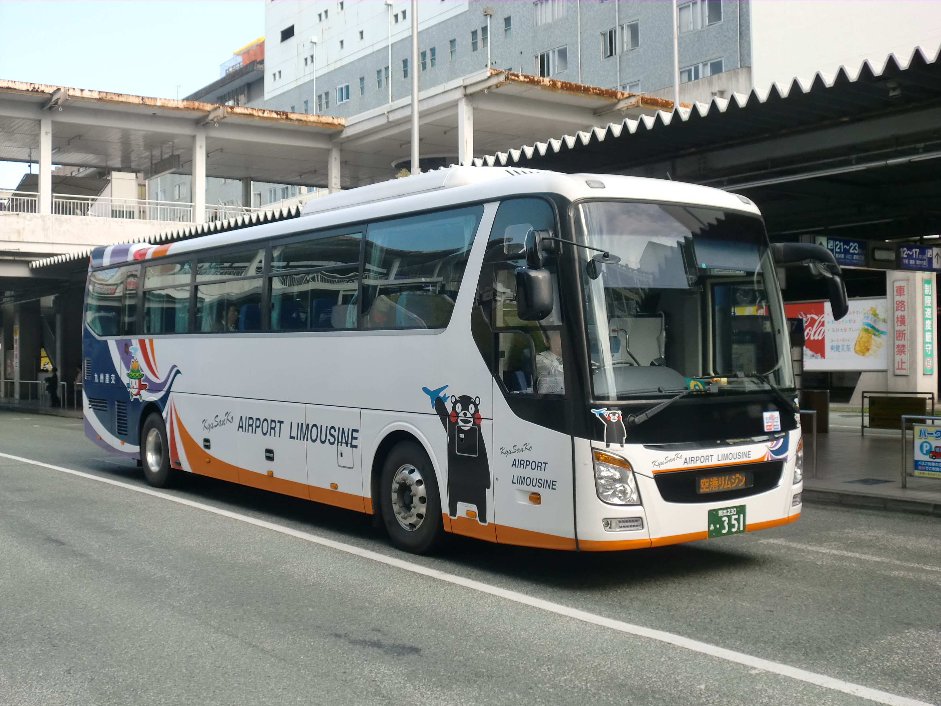 九州産交バス空港バス